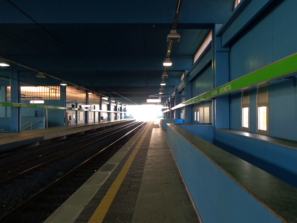 Metropolitana di Milano, la stazione di Cascina Antonietta